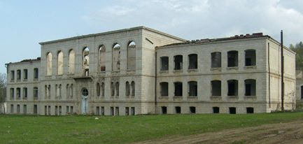 Ռեալական ուսումնարանը կառուցվել է Շուշիի պատվավոր քաղաքացի Գրիգորի մարտենի Առաֆքելովի կողմից 1901-1908թթ.